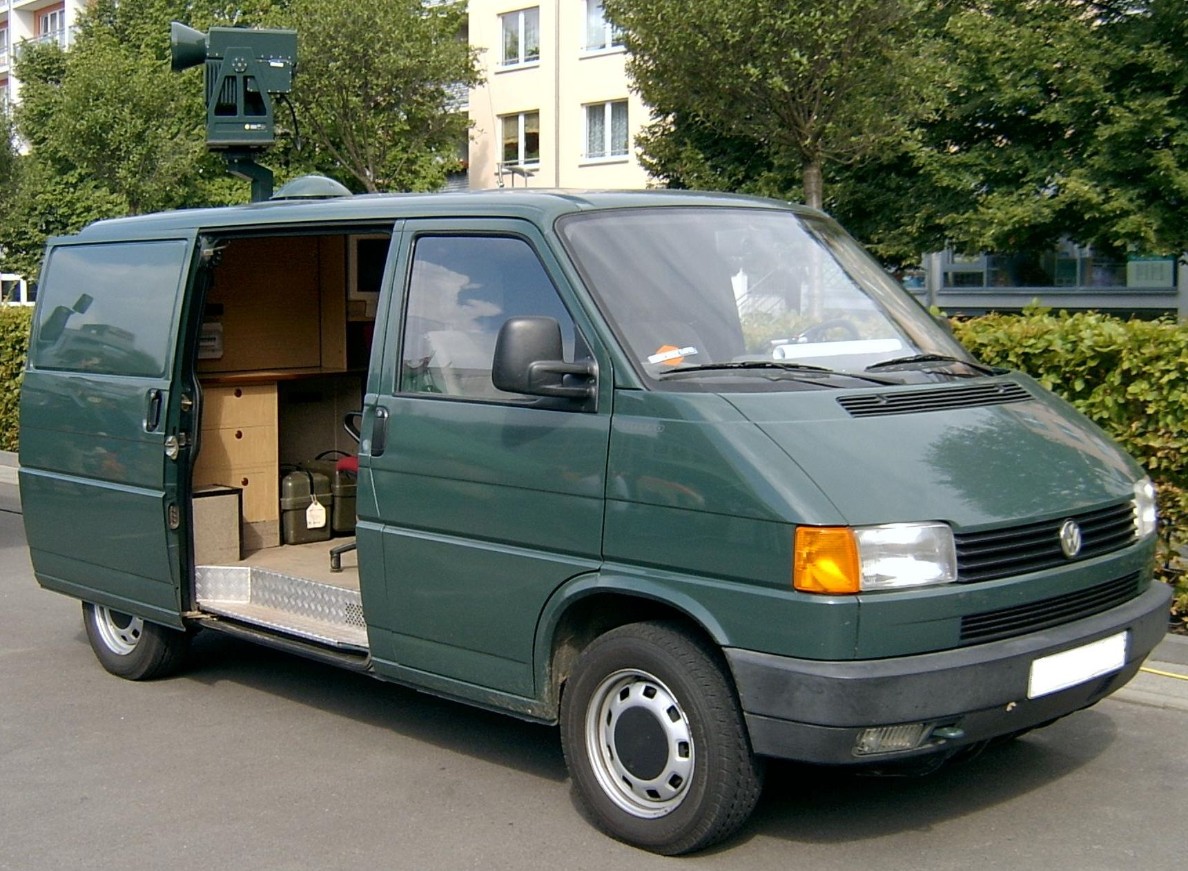 Volkswagen Transporter der Bundespolizei. Ausgestattet mit einer Wärmebildkamera zur Grenzbeobachtung. Einsatzgebiet hier; Oder